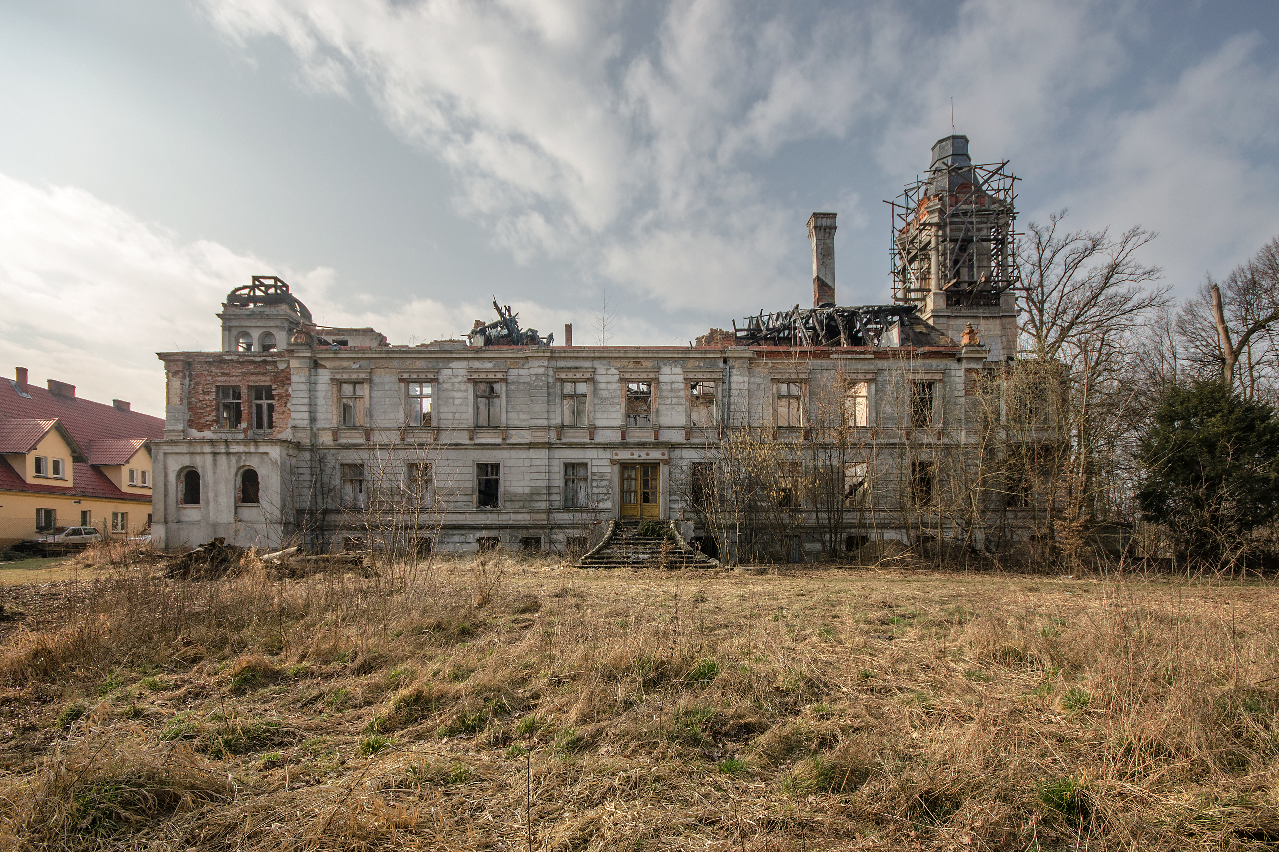 Stradomia Górna Stradomia Wierzchnia 53, pałac, 1880